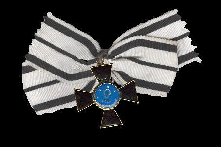 Scan van een kruis in mijn eigen collectie. Een foutje op het lint is geretoucheerd.